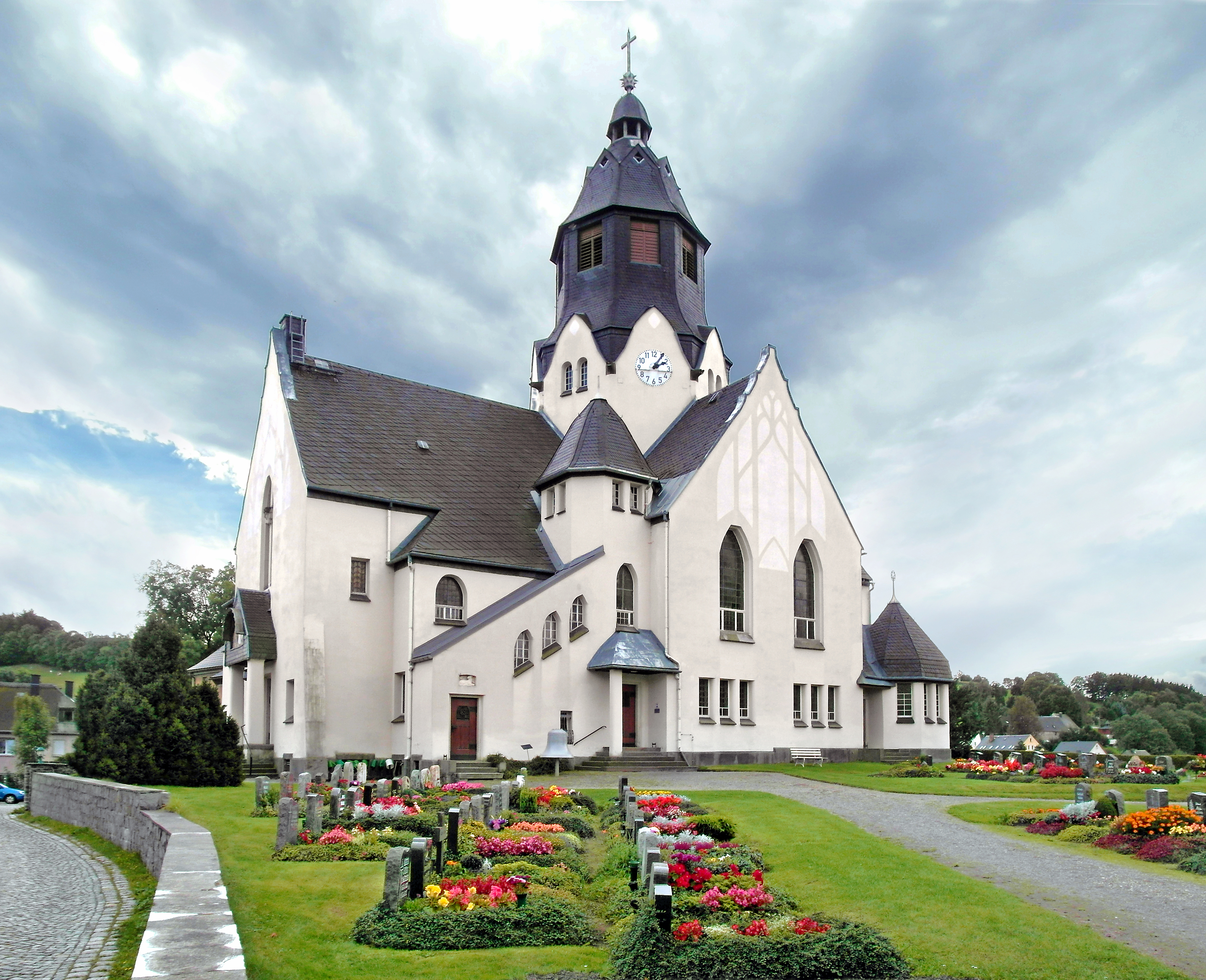 11.09.2017 09488 Wiesa (Thermalbad Wiesenbad), An der Kirche 1 (GMP: 50.611754,13.019376): St. Trinitatiskirche, erbaut 1903/04 im Jugendstil nach Plänen von Schilling & Graebner. Sicht von Nordosten. [SAM1869.JPG]20170911200DR.JPG(c)Blobelt